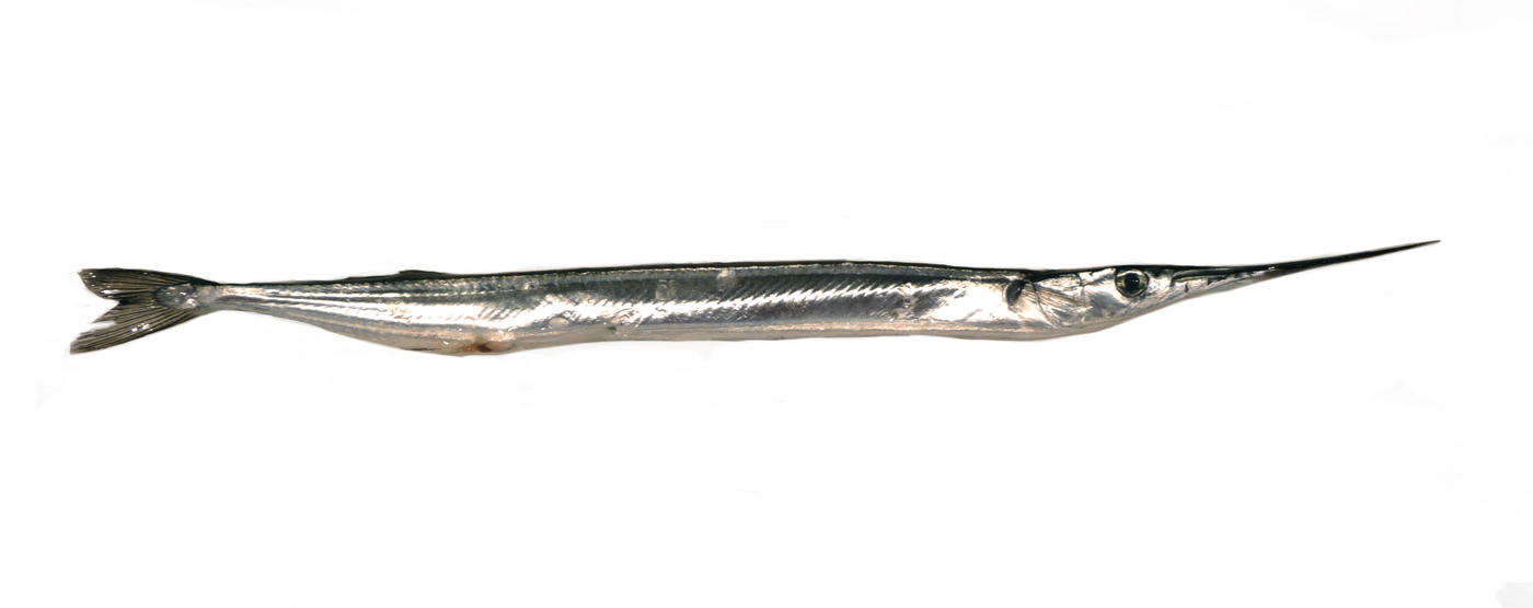 Belone belone